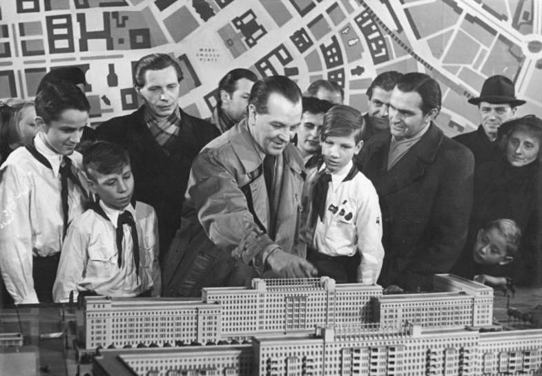 Zentralbild Quaschinsky 26.11.1952 Die DEFA dreht "die neue Wohnung", einen Kulturfilm über die sozialistischen Grossbauten in der Stalinallee Berlin. In der Sporthalle Stalinallee. UBz: Szenenbild: Nationalpreisträger Paulick erklärt den Aufbau der Wohnblöcke.